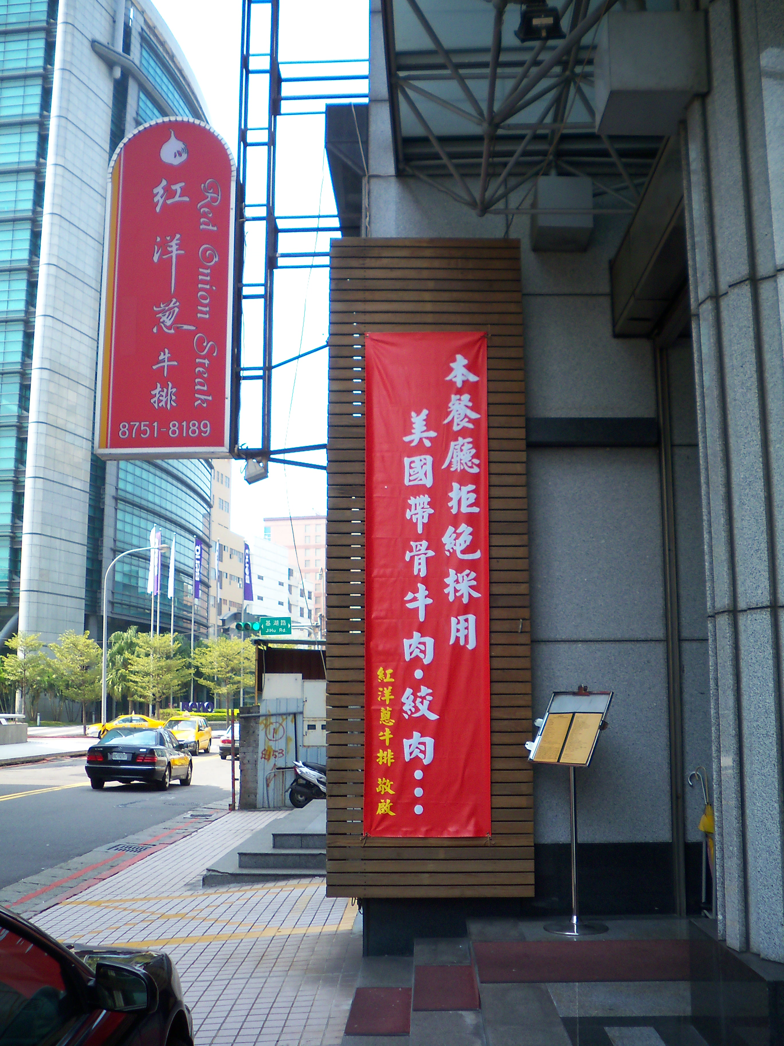 中文（台灣）: 臺北市內湖區紅洋蔥牛排，入口前懸掛拒用美國牛肉的直幅。